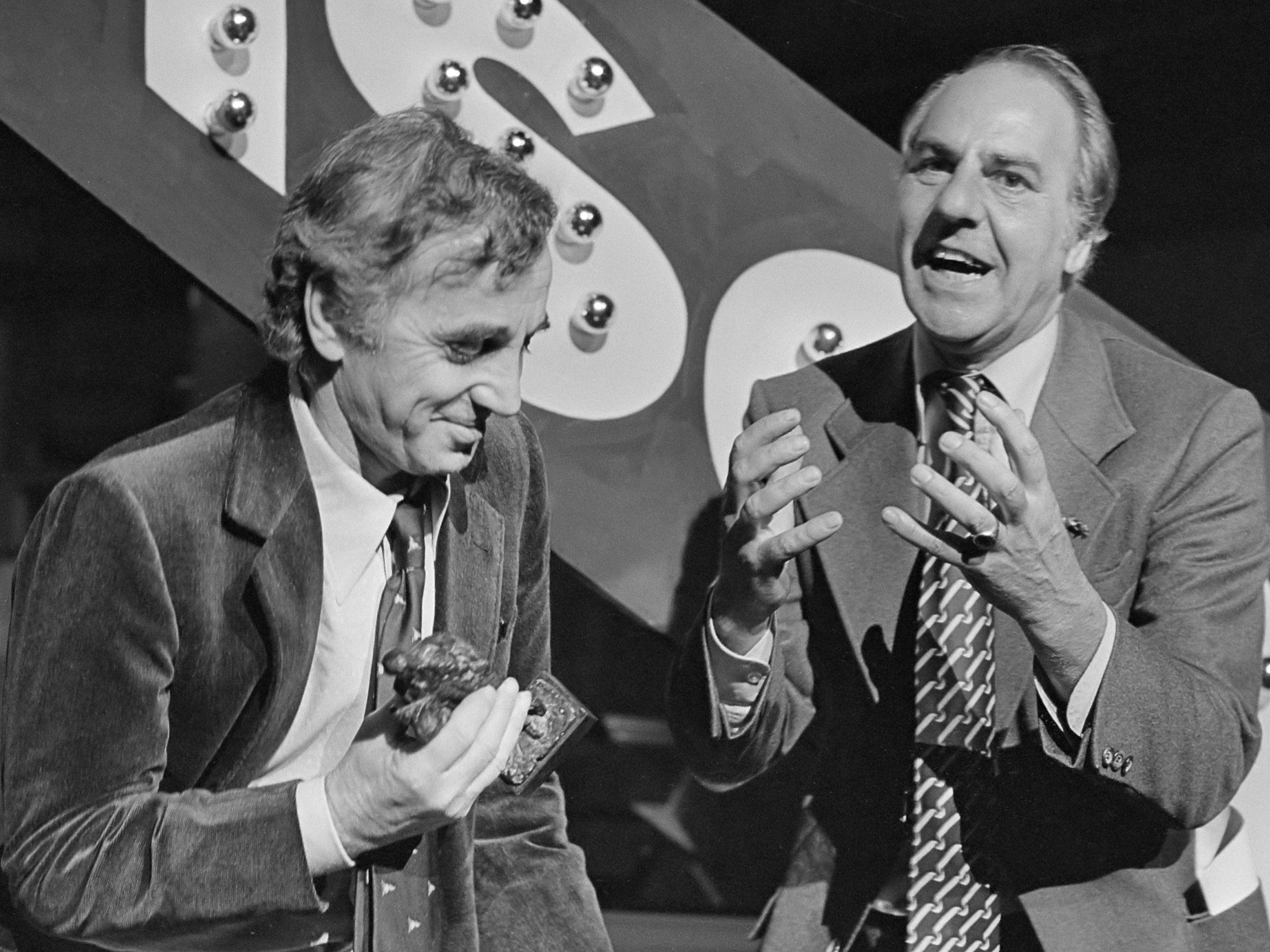 Generale repetitie voor AVRO-programma Edisons in concert Muziekcentrum Vredenburg te Utrecht, uitzending 31-10. Links Charles Aznavour, rechts Willem Duys 28 oktober 1980